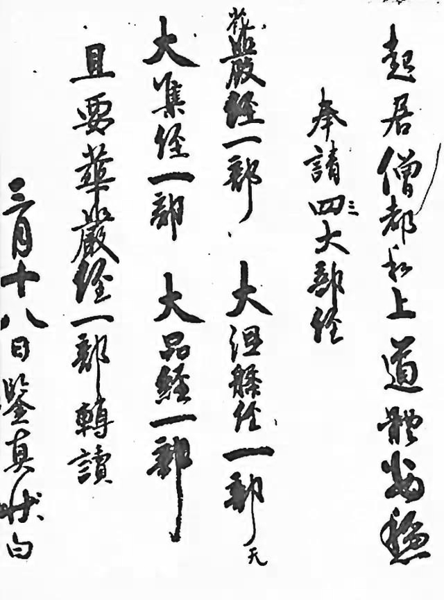 現藏日本唐招提寺的鑒真請經帖。